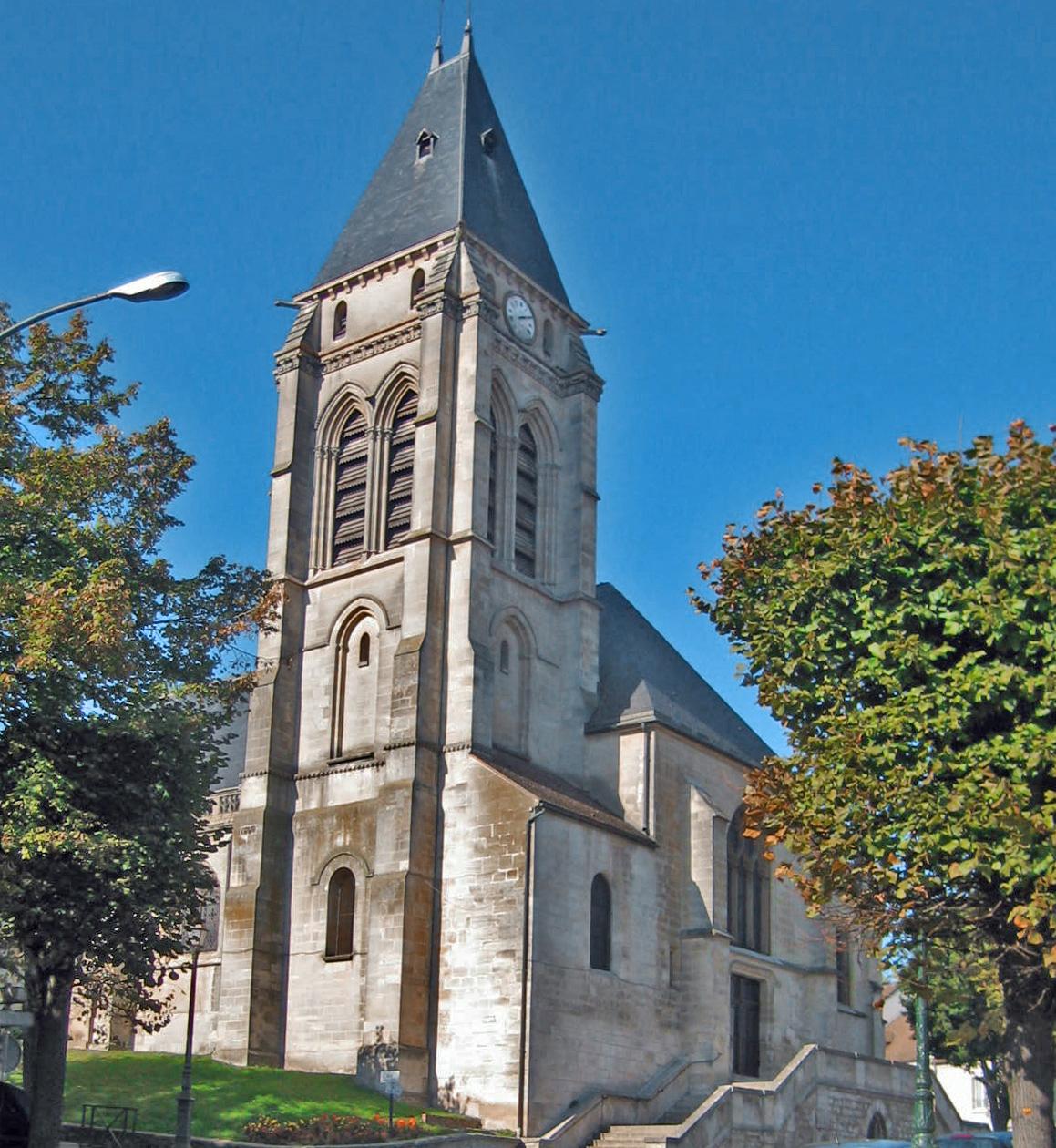 Église Saint-Leu-Saint-Gilles de Thiais. (Val-de-Marne, Île-de-France)